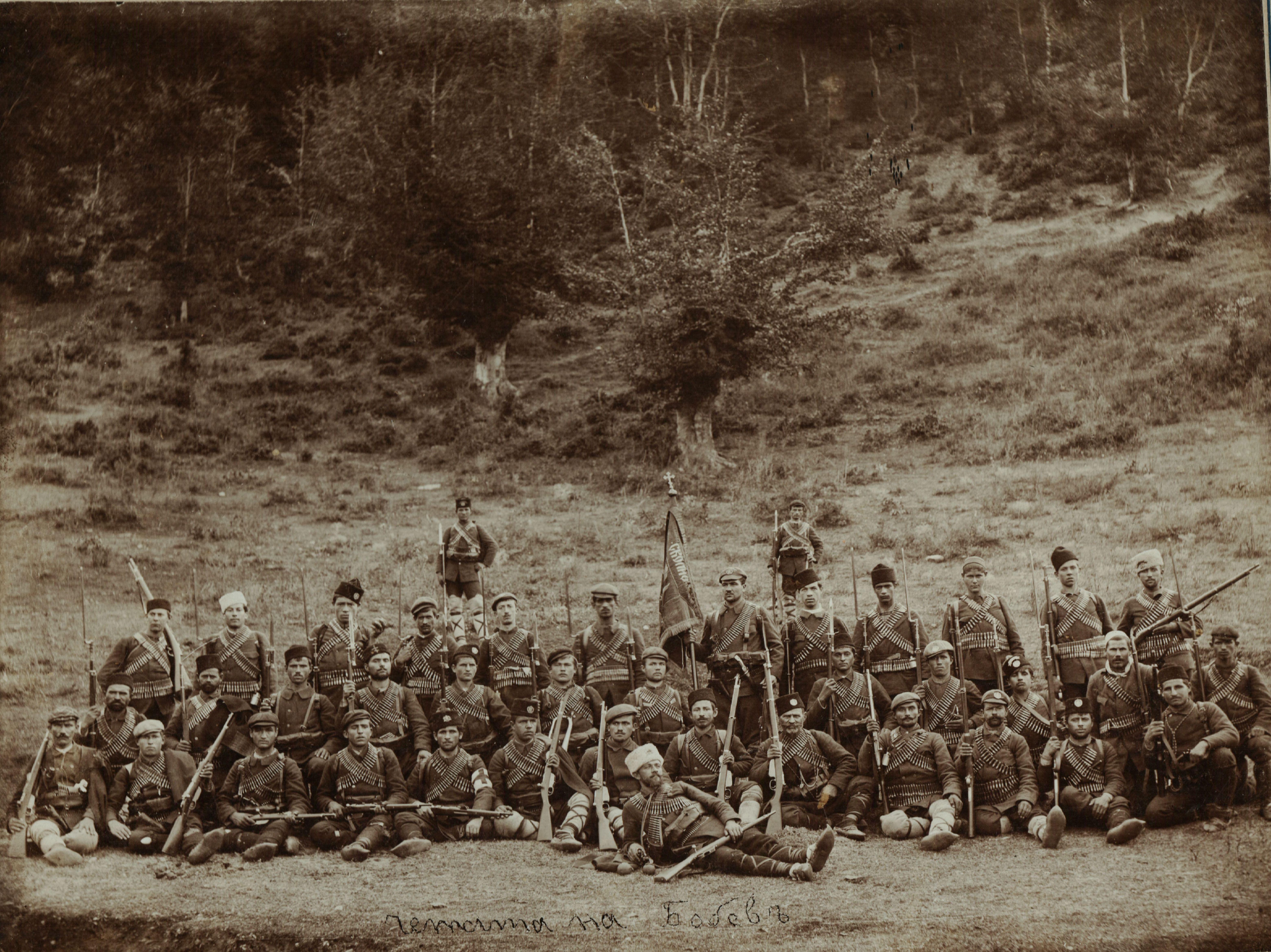 Снимка на четата на Боби Стойчев